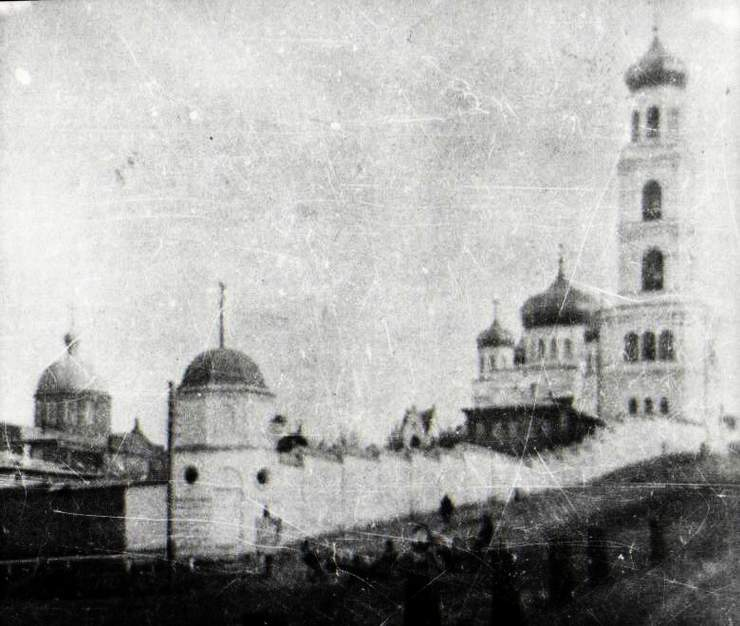 Самара. Иверский женский монастырь. Слева направо купол Иверского храма, угловая башня стены в форме часовни, Сретенский храм, колокольня